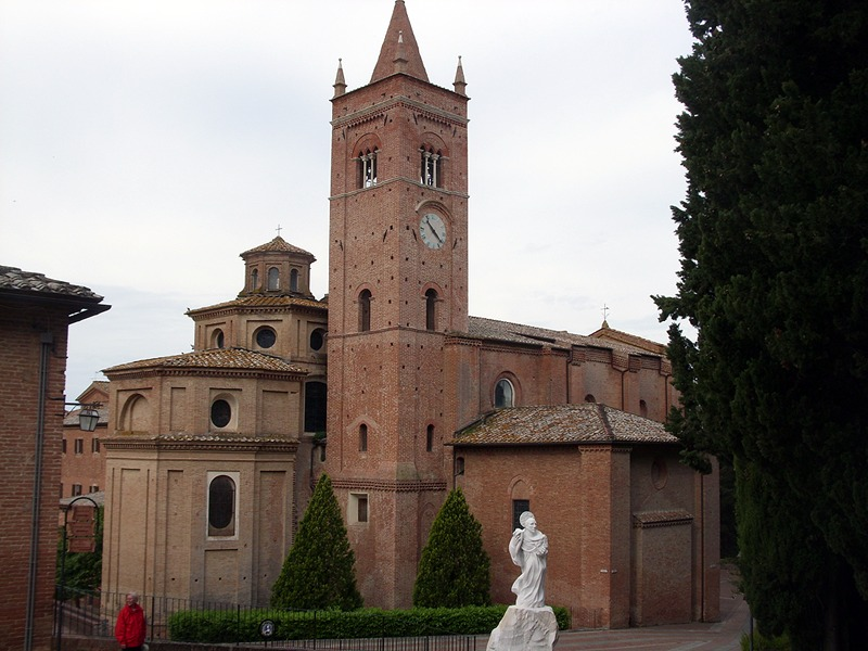 Monte Oliveto Maggiore - Chiesa abbaziale